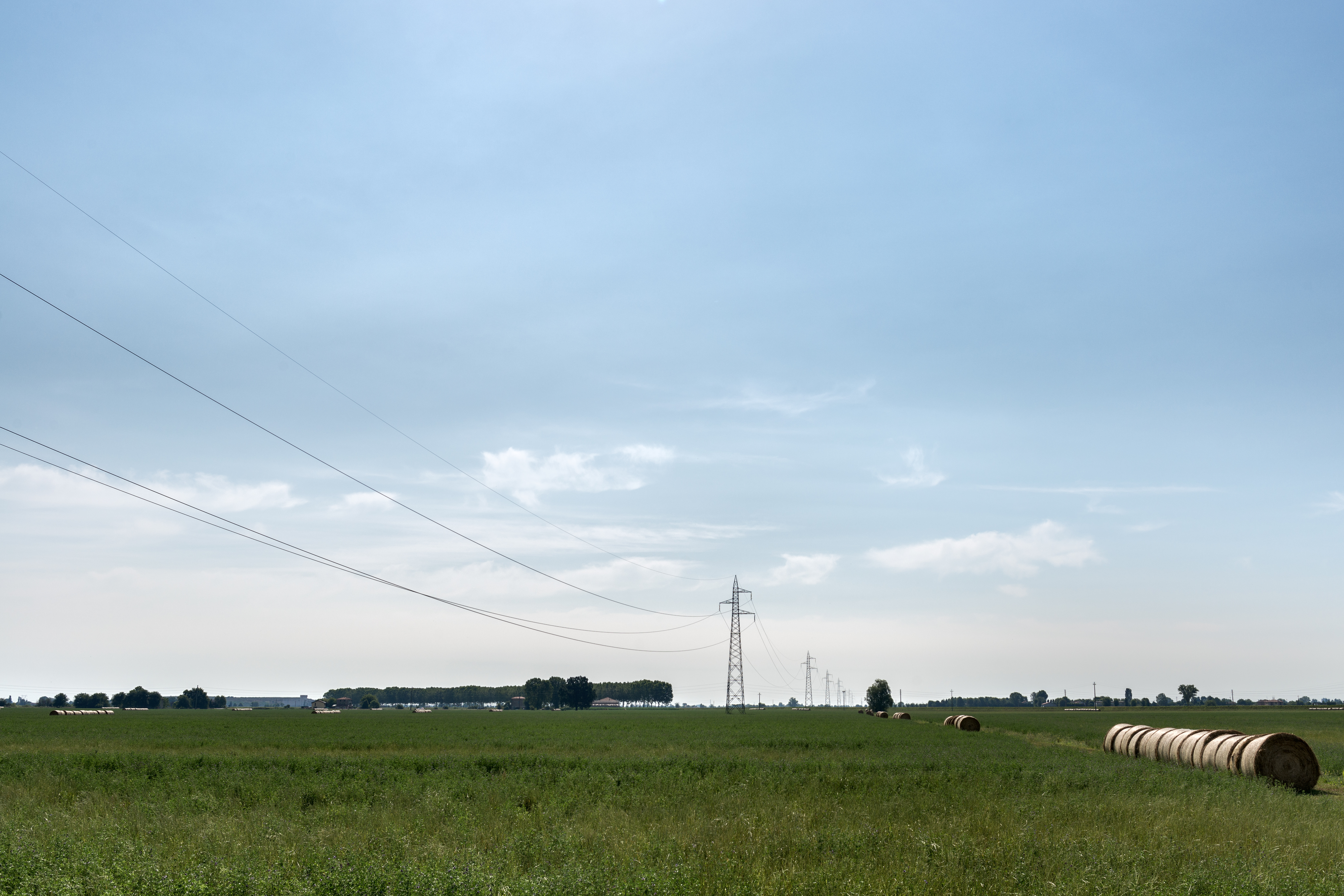 Bassa Bolognese - Sant'Agata Bolognese, Bologna, Italia